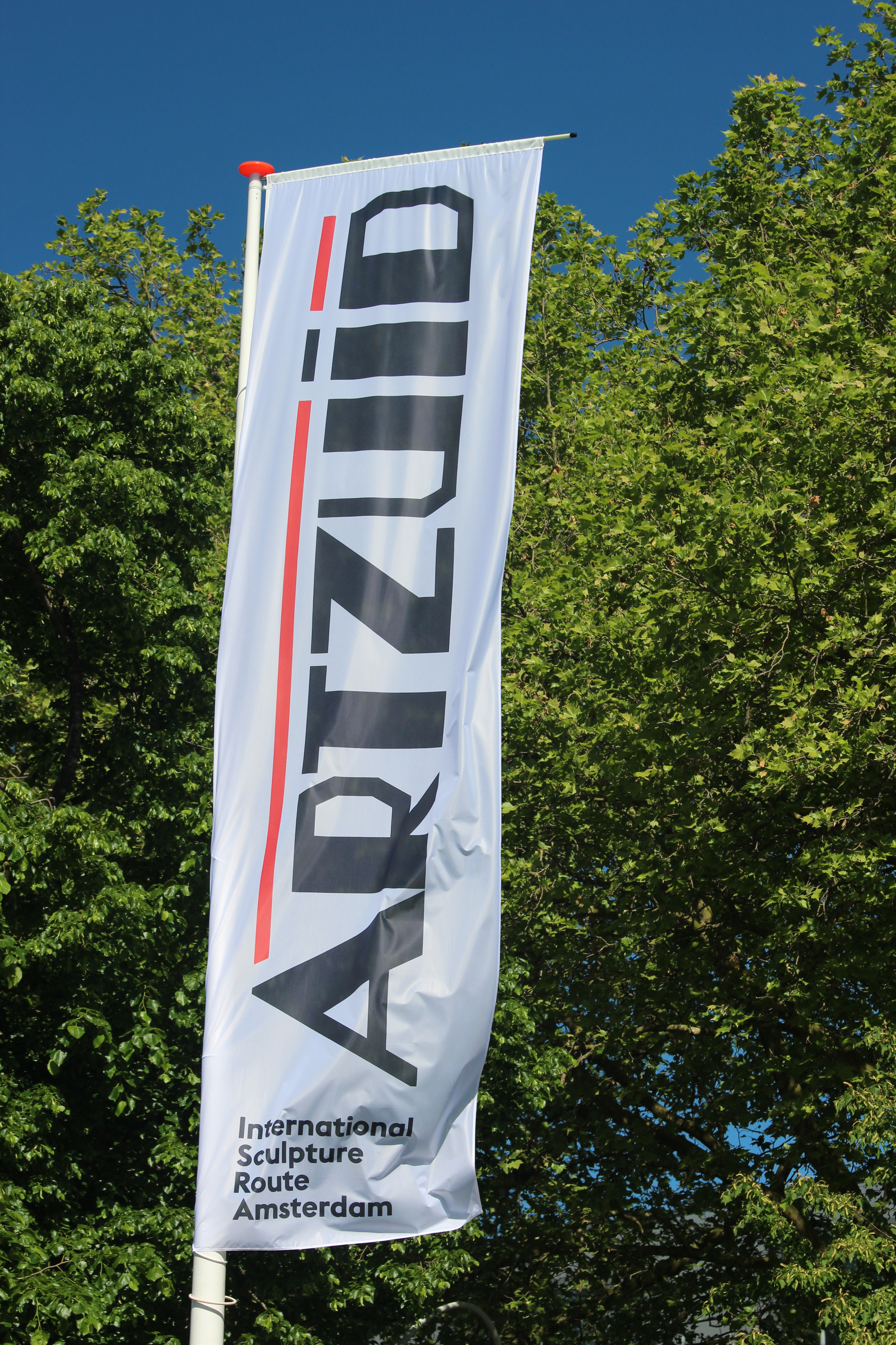 Foto gemaakt op de tweejaarlijks beeldententoonstelling ArtZuid in 2017.